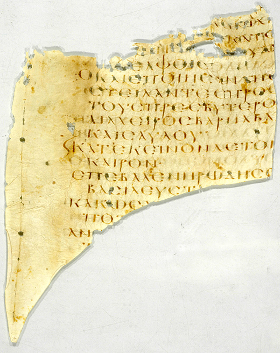 side recto with the text of Acts 11:29 – 12:2